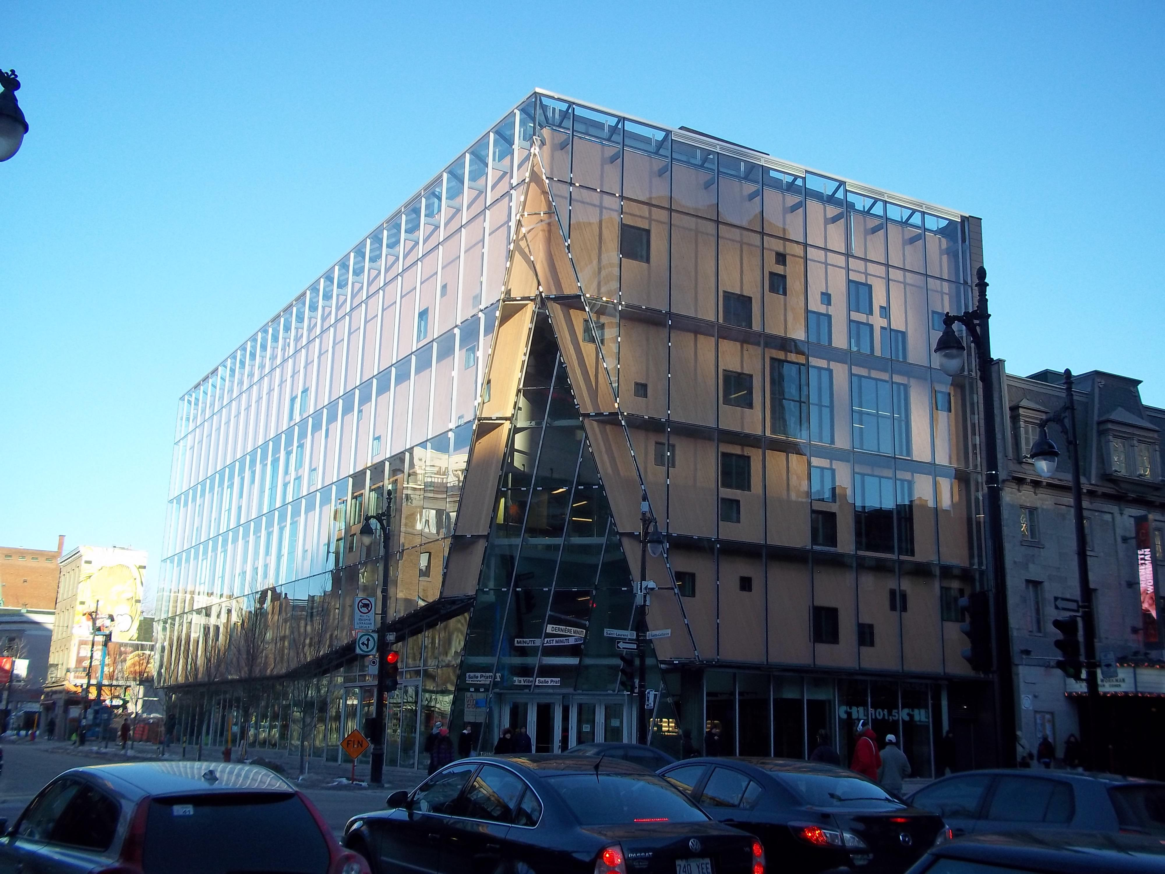 2-22 Sainte-Catherine Est